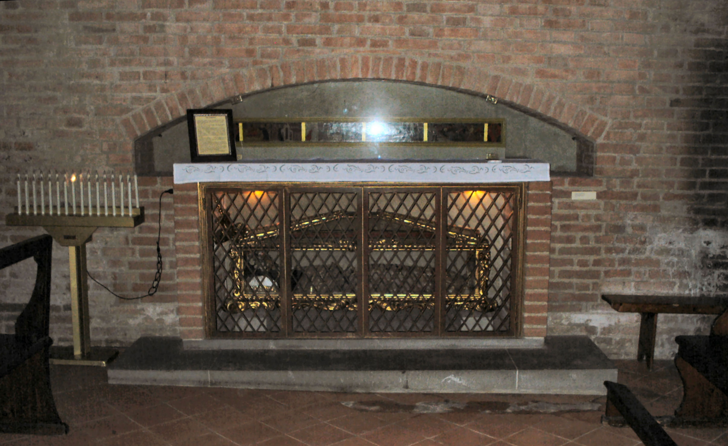 Beata Giulia, tomba nella chiesa dei Santi Jacopo e Filippo a Certaldo.